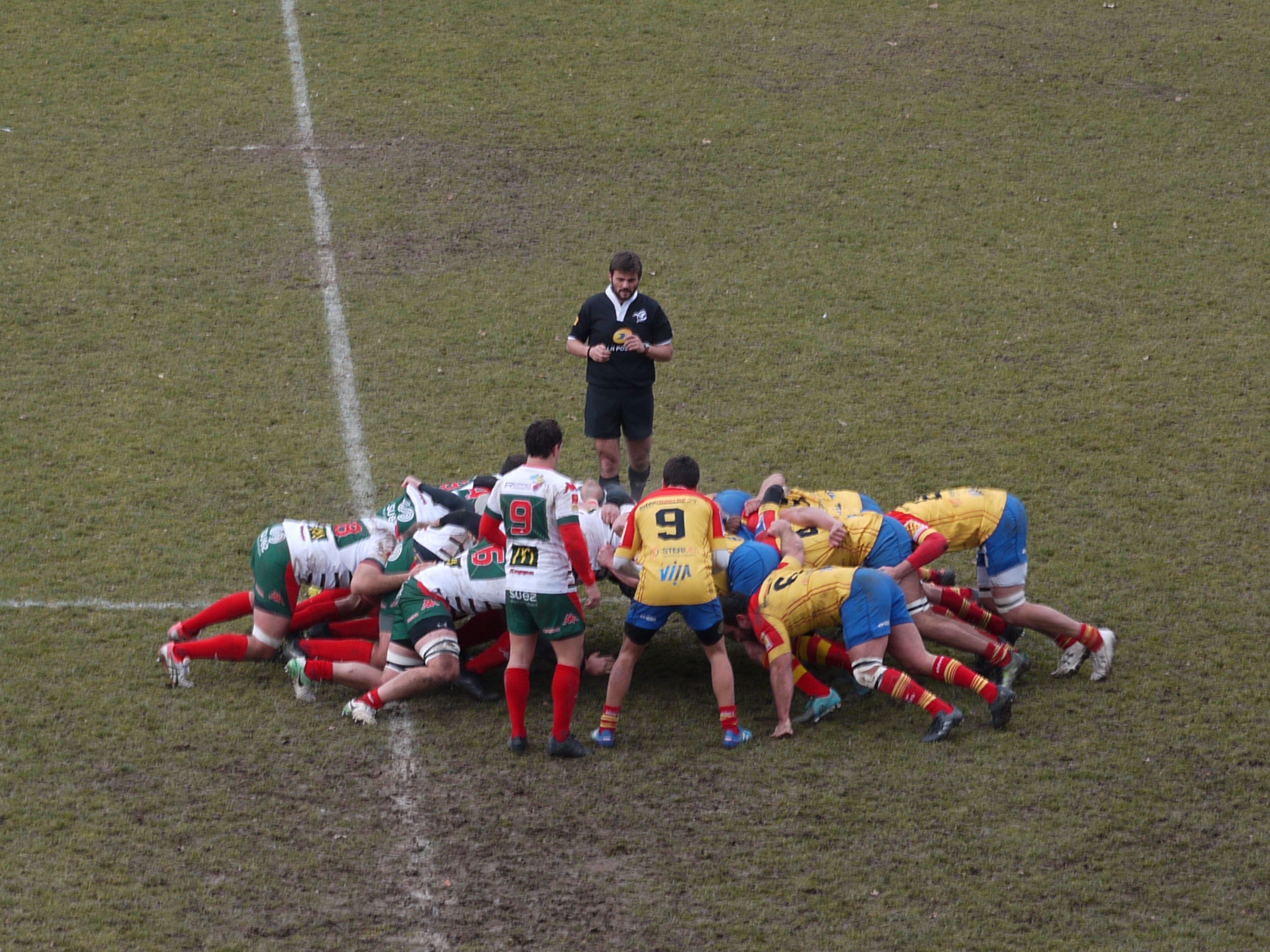 Céret sportif vs RC Nîmes au stade Fondecave de Céret le 10 décembre 2017.